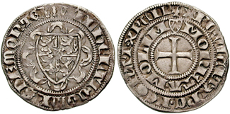 Germany, Herzogtum Berg. William, as Count (Graf). 1360-1380. AR Turnose (Weißpfenning) (2.39 gm). Mülheim mint. +WILhELM COMES DE MONTER, arms on polylobe (Shield) MONETA MOLIM, cross. Saurma 2954/1588. see: Wilhelm II. (Jülich-Berg), Guillaume II de Berg see: Herzogtum Berg